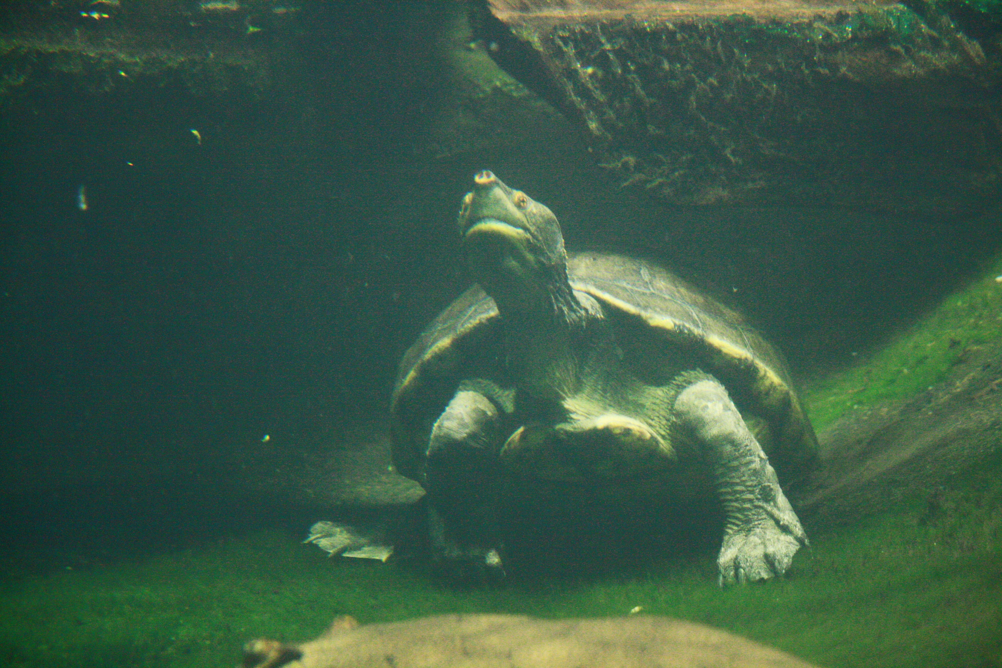 Zoo Praha